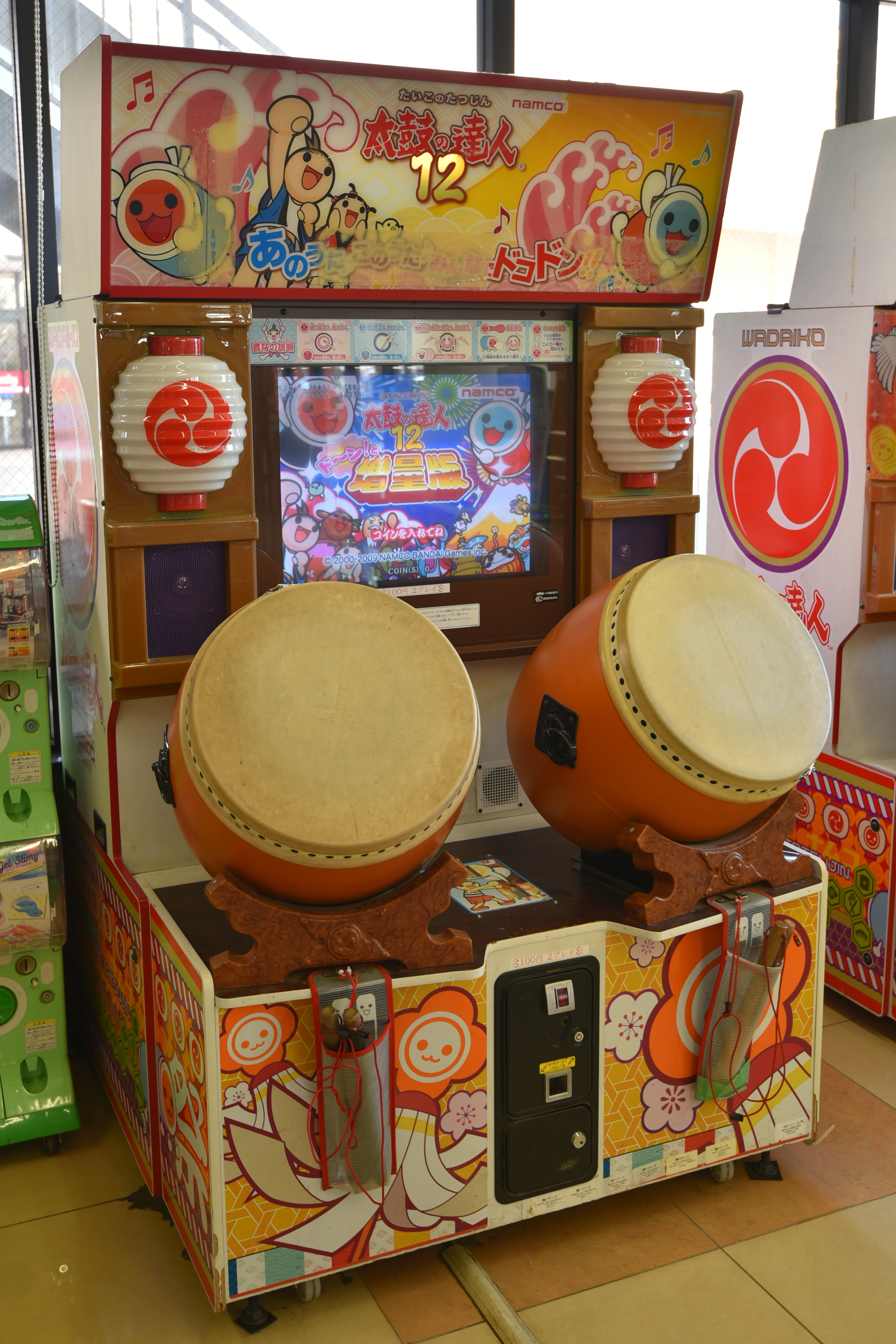 アーケードゲーム版『太鼓の達人12 ド〜ン!と増量版』（ナムコ）の筐体。いわゆる旧筐体とよばれるもの。